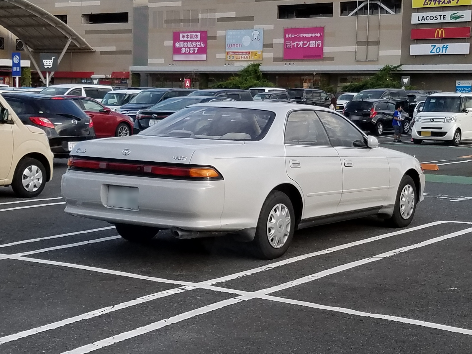 マークII グランデ(前期型)